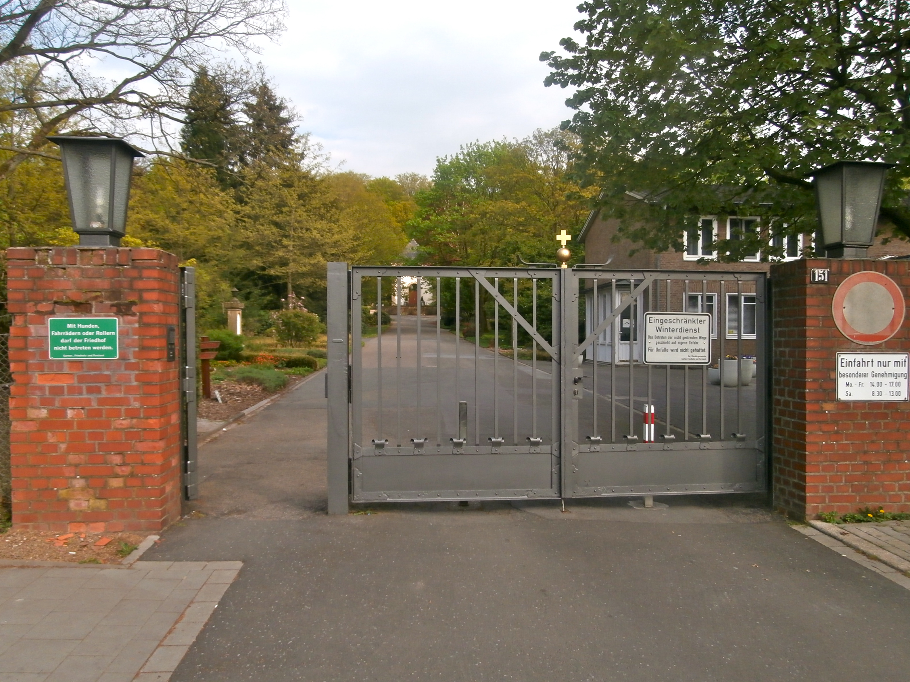 Haupteingang des Gerresheimer Waldfriedhofs